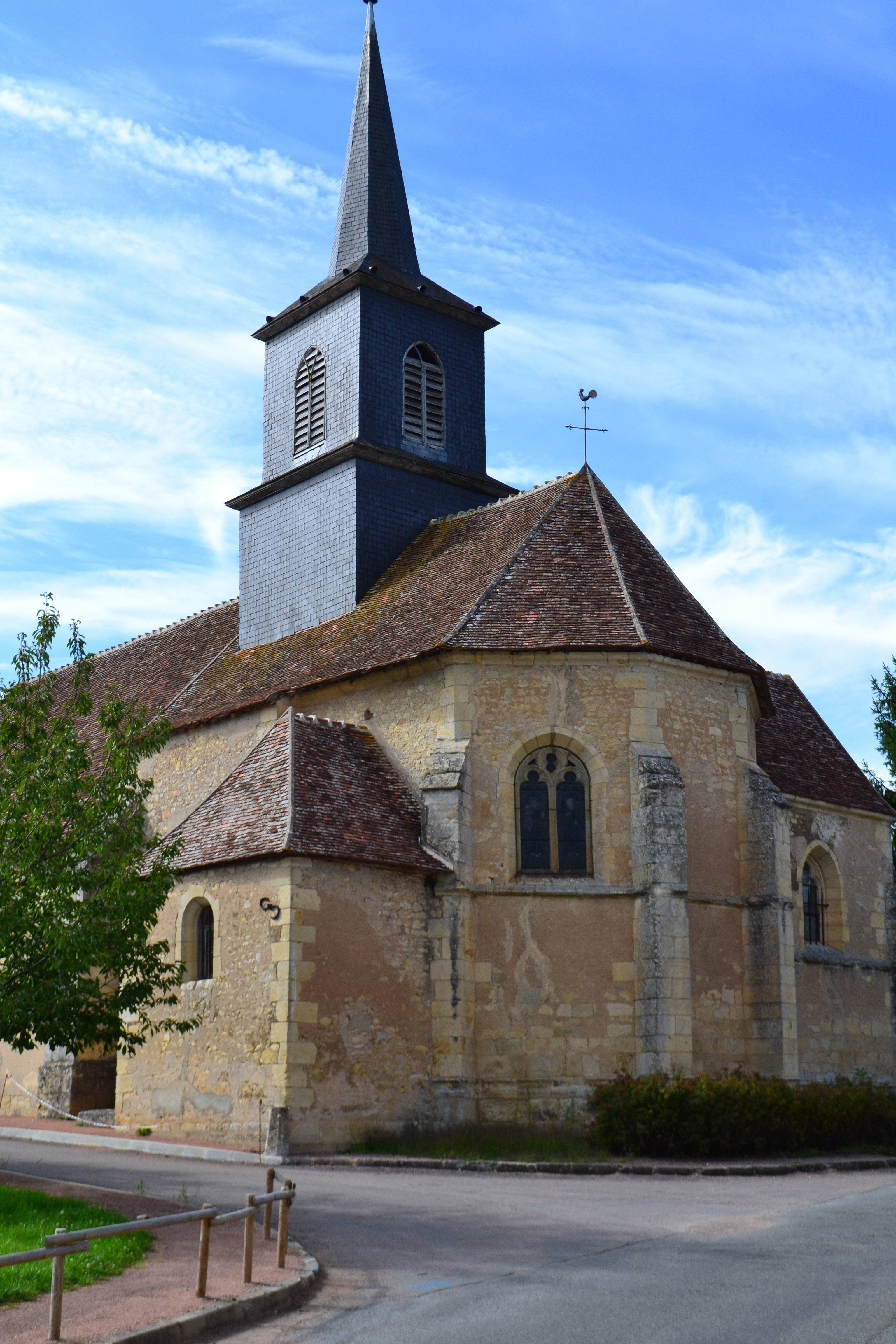 Eglise de Saint-Martin-d'Heuille (Nièvre)